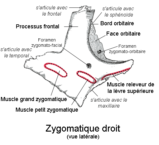 Zygomatique droit. Vue latérale. Anatomie humaine